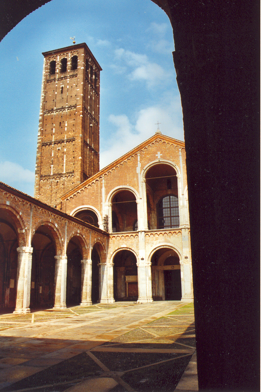 Basilica di Sant’Ambrogio, Milano